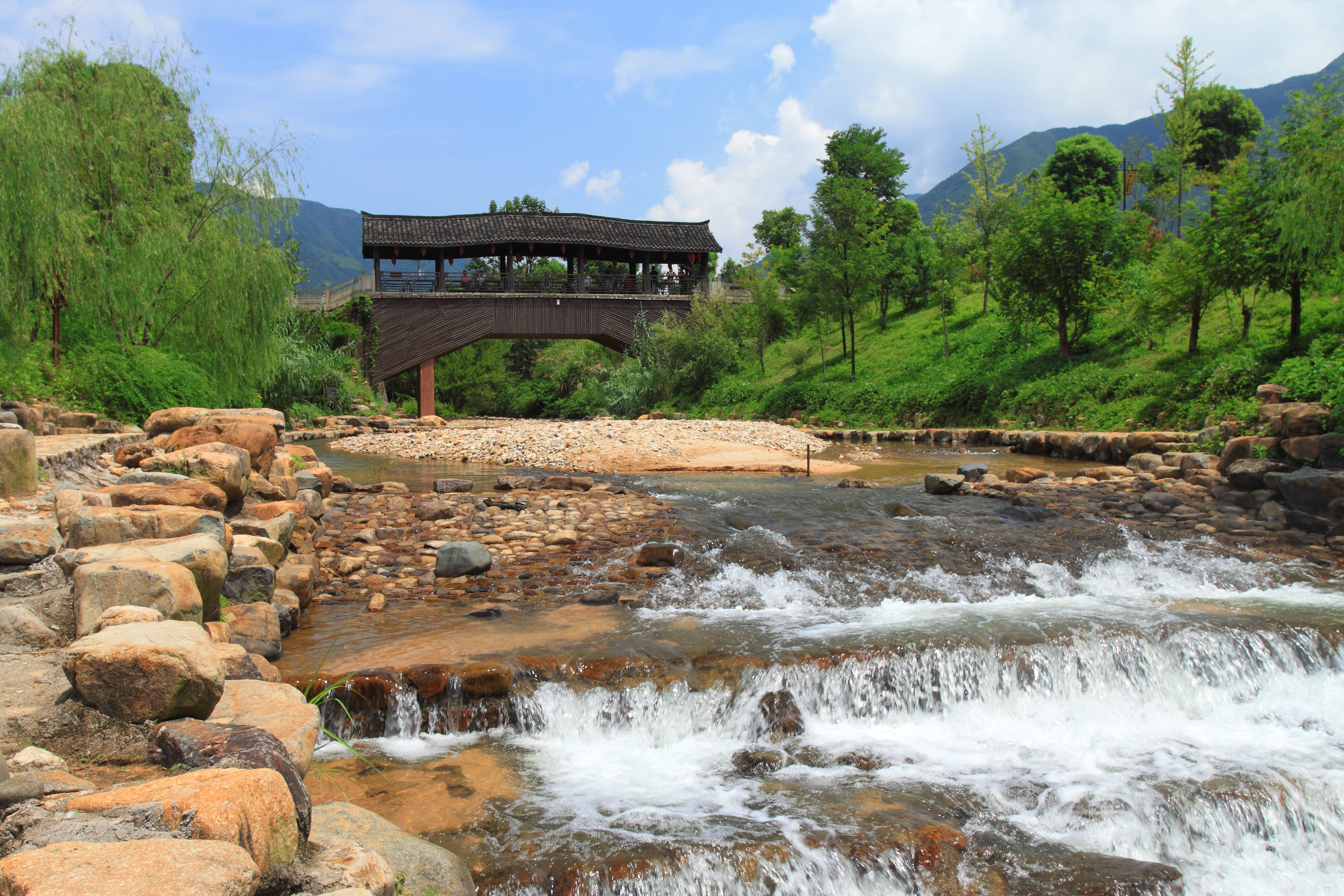 廿八都镇，位于中国浙江省江山市。